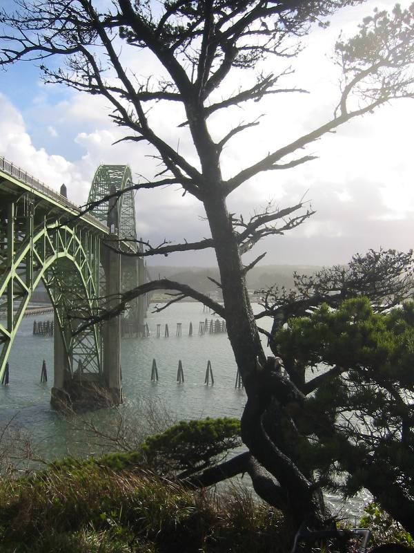 Yaquina Bay Bridge, Oregon, USA